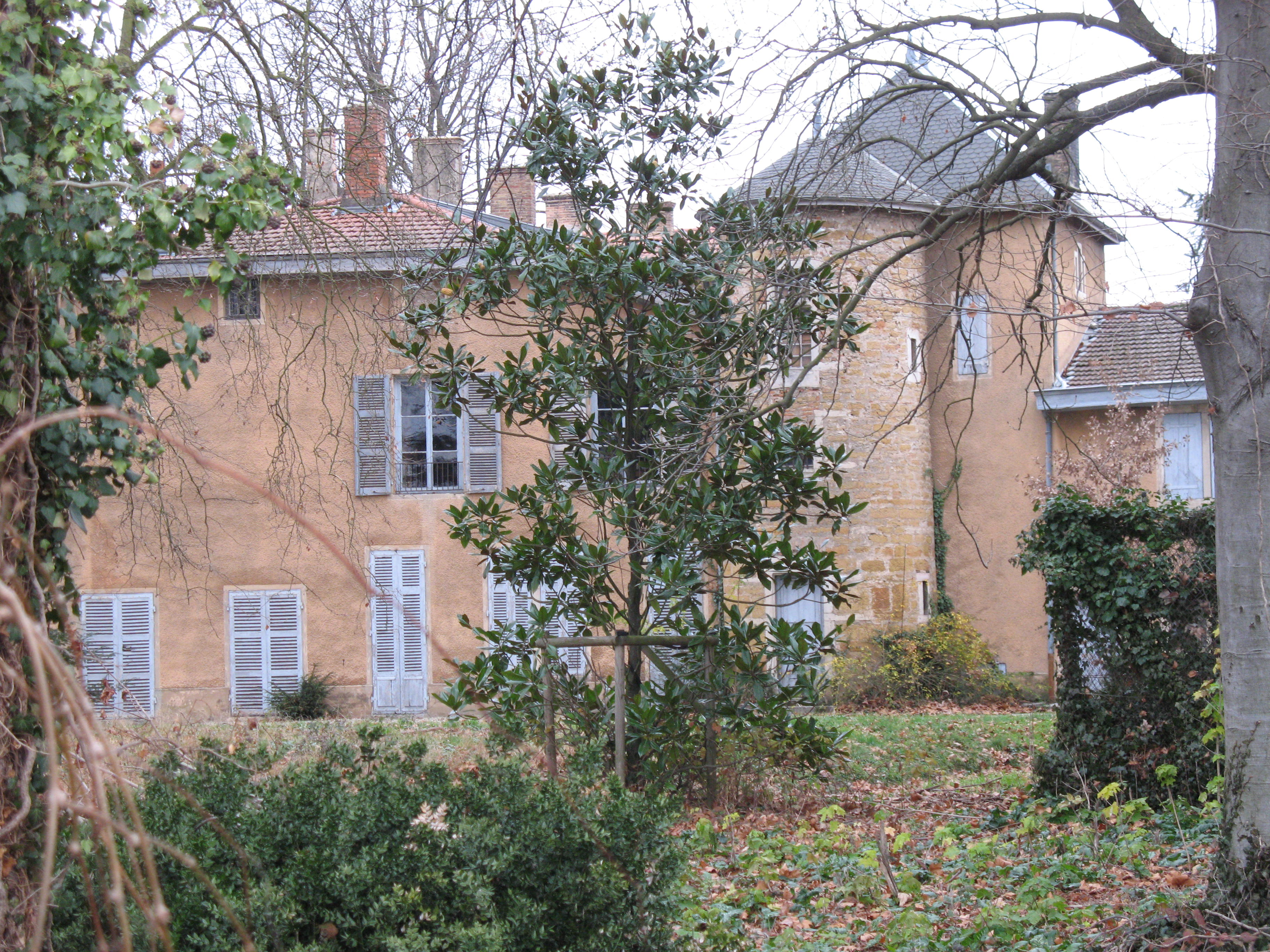 Château de Noailleux à Cailloux-sur-Fontaines dans le Rhône, vue prise en fouinant à travers la clôture